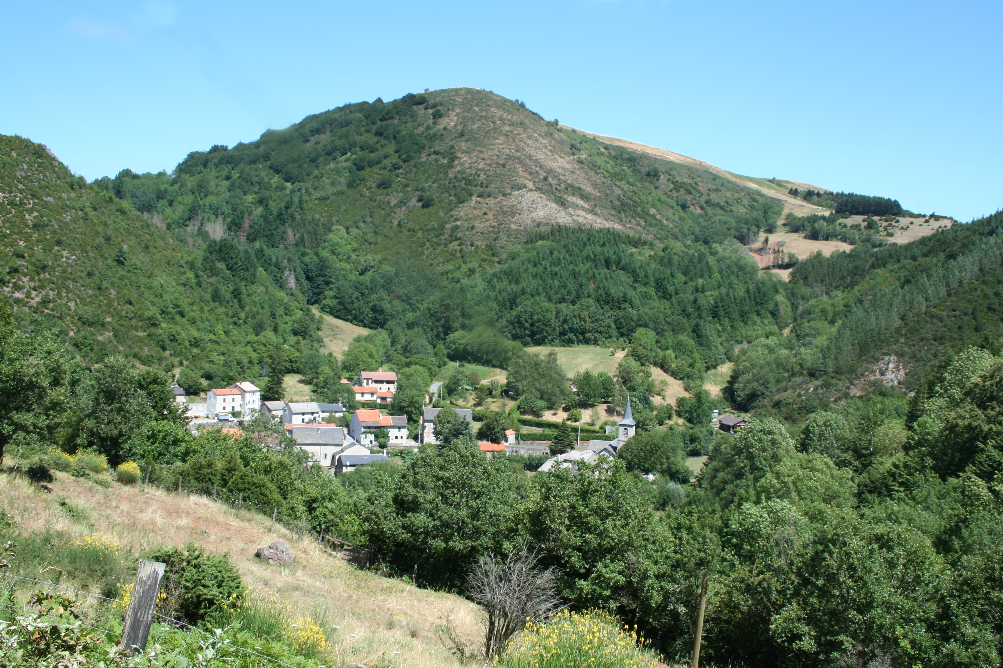 Mélagues (Aveyron) - Vue générale.